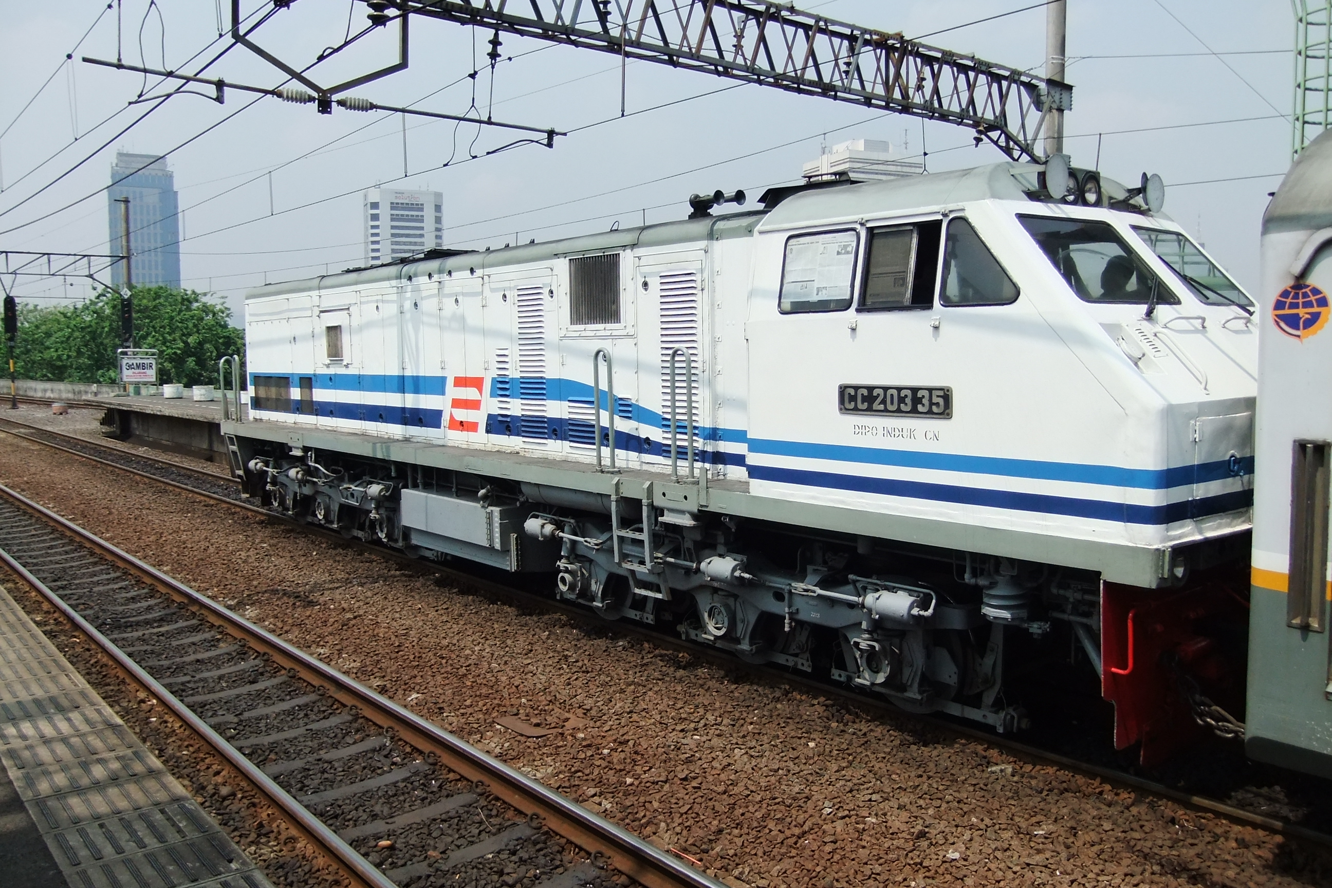 Lokomotif CC20335, Stasiun Pasar Turi